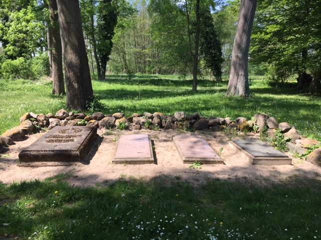 Grabplatten derer von Arnim im Gutspark Gerswalde